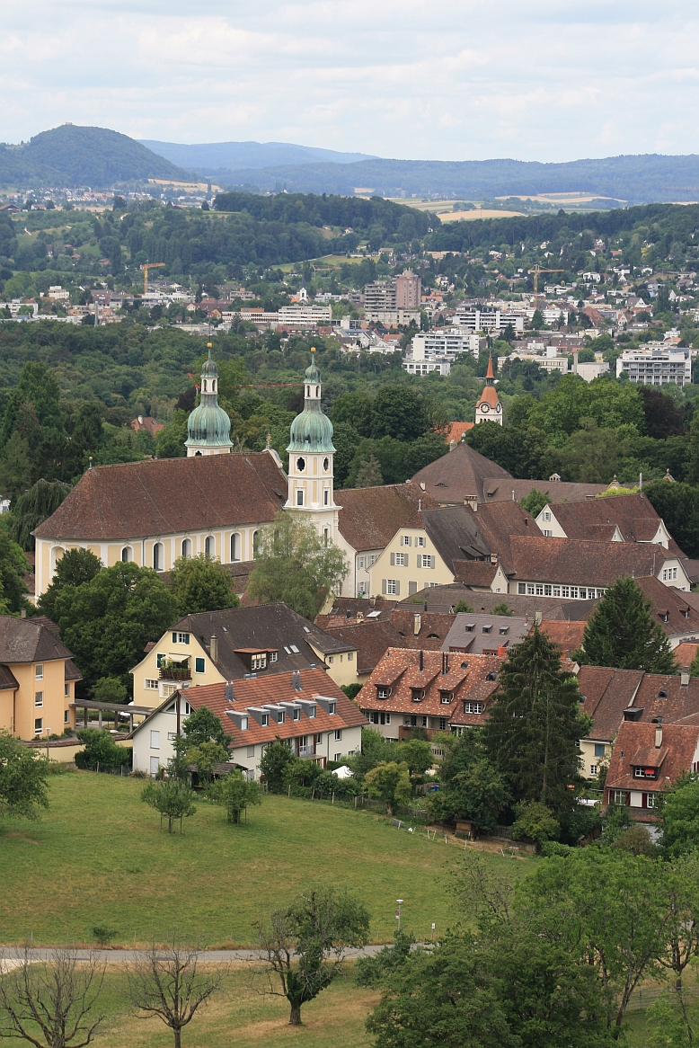 Arlesheimer Dom von Schloss Birseck aus gesehen. Im Hintergrund Reinach und Ruine Landskron in Frankreich